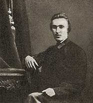 Evgenij Osipovic Zaslavskij (1844-1878)